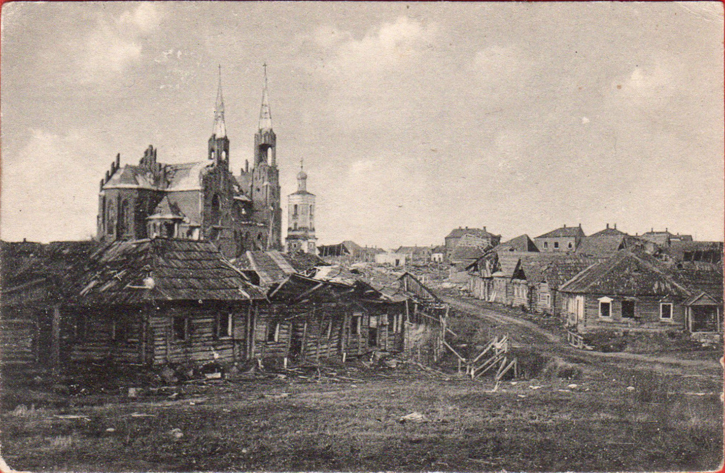 Беларуская (тарашкевіца): Відзы (Vidzy), рог пляцу Рынку (plac Rynak) і вуліцы Татарскай (vulica Tatarskaja)